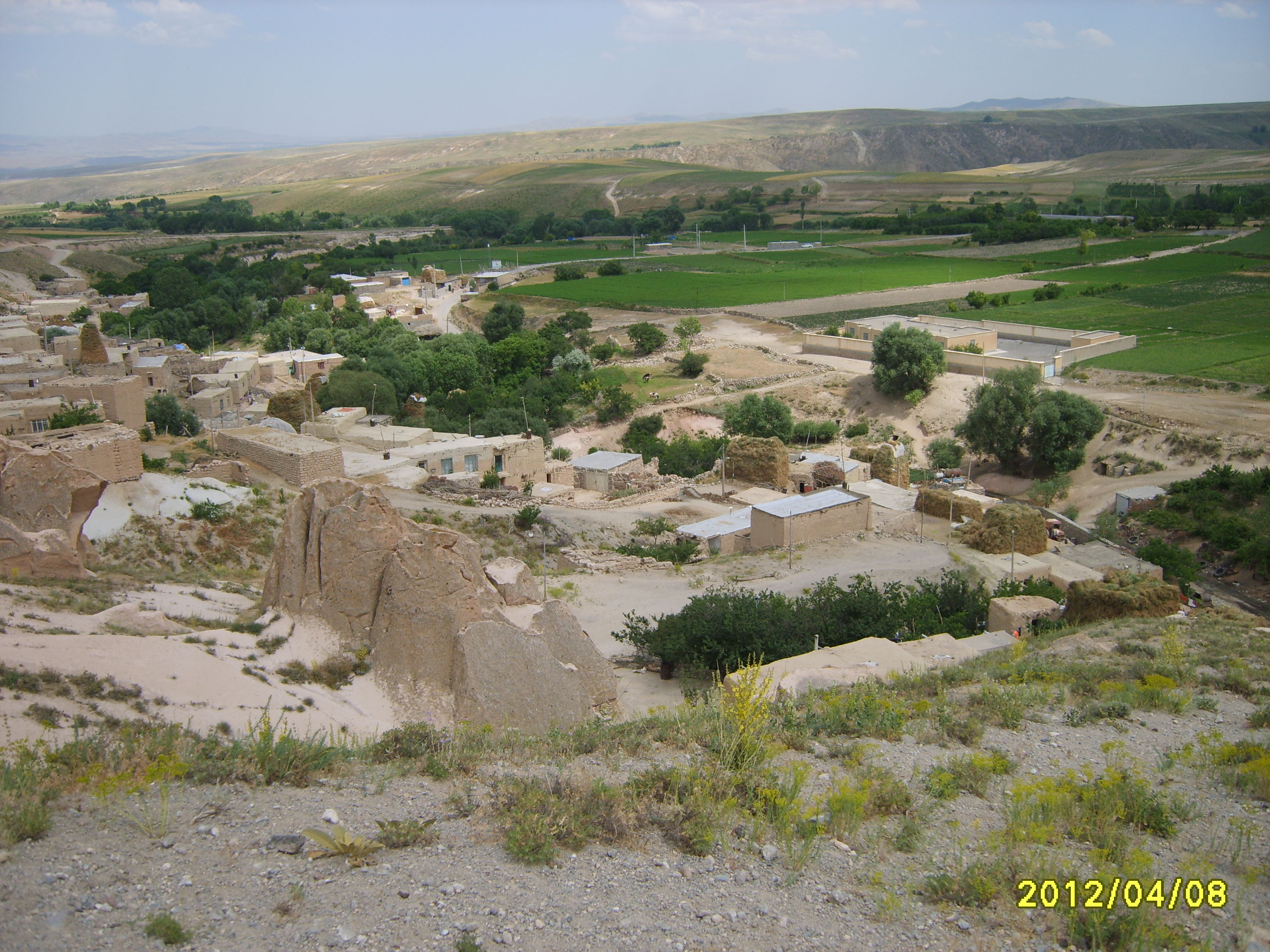 روستاي ساران.واقع در استان اذربايجان شرقي.شهرستان بستان اباد.دهستان مهرانرود جنوبي